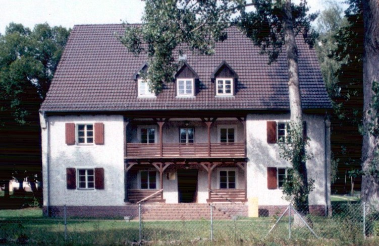 Mahn- und Gedenkstätte KZ Ravensbrück - Wohnhaus für die SS-Wachmannschaft